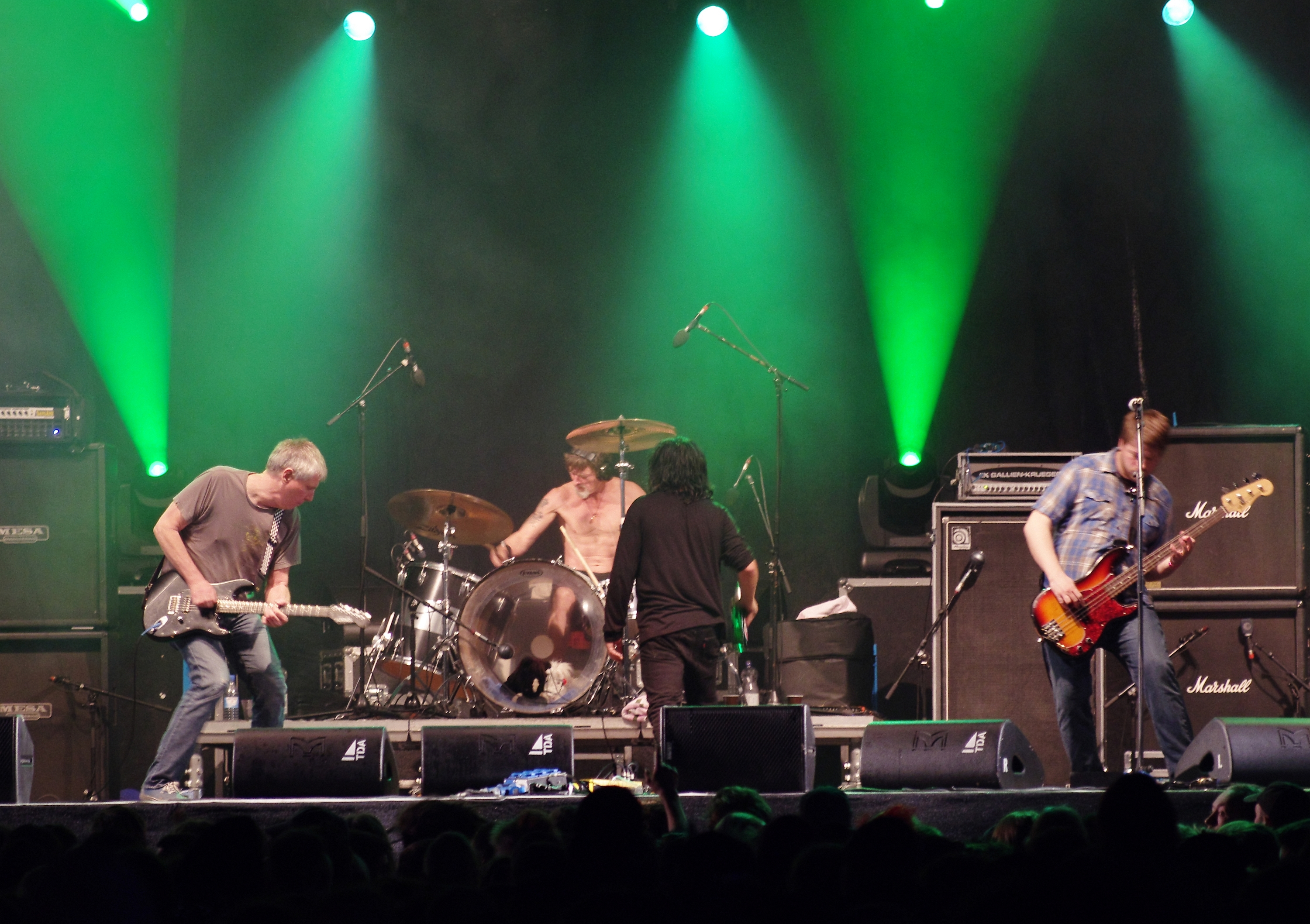 Black Flag beim Ruhrpott Rodeo 2013 in Hünxe. Besetzung: Dave Klein (Bass), Greg Ginn (guitar), Ron Reyes (voc), Gregory Moore (dr)